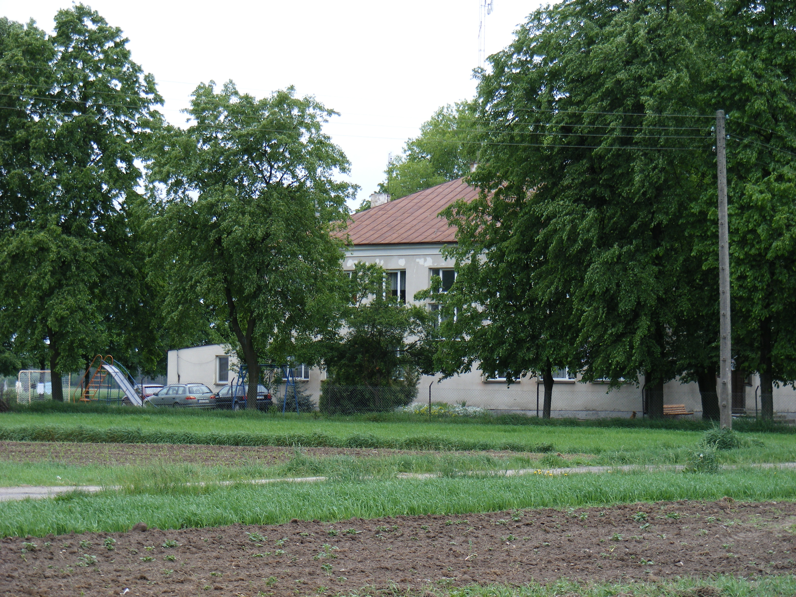 Wólka Konopna-widok na budynek szkoły podstawowej.